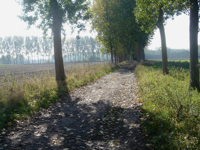 Mérignies allée principale du château